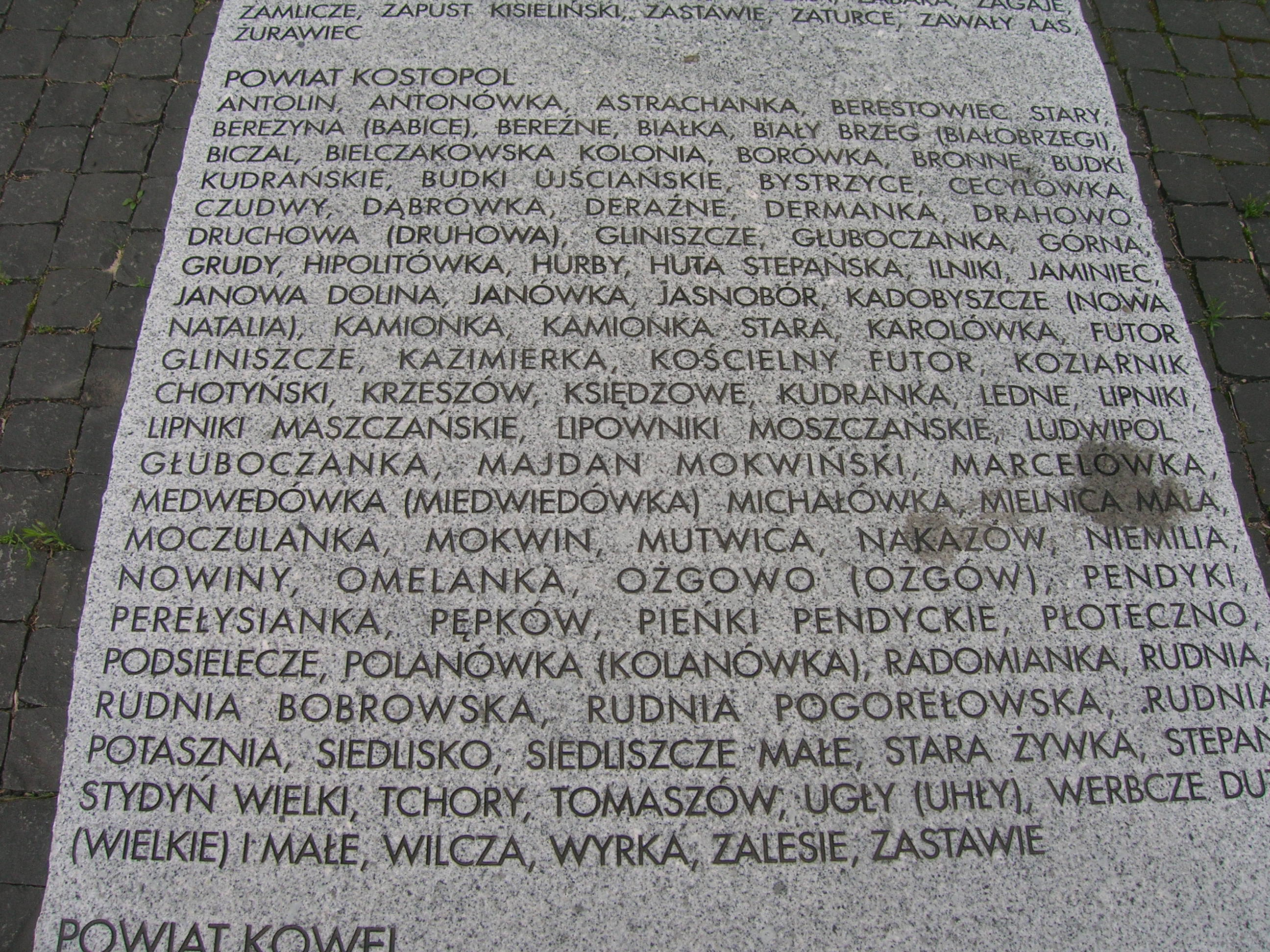 tablica powiat Kostopol